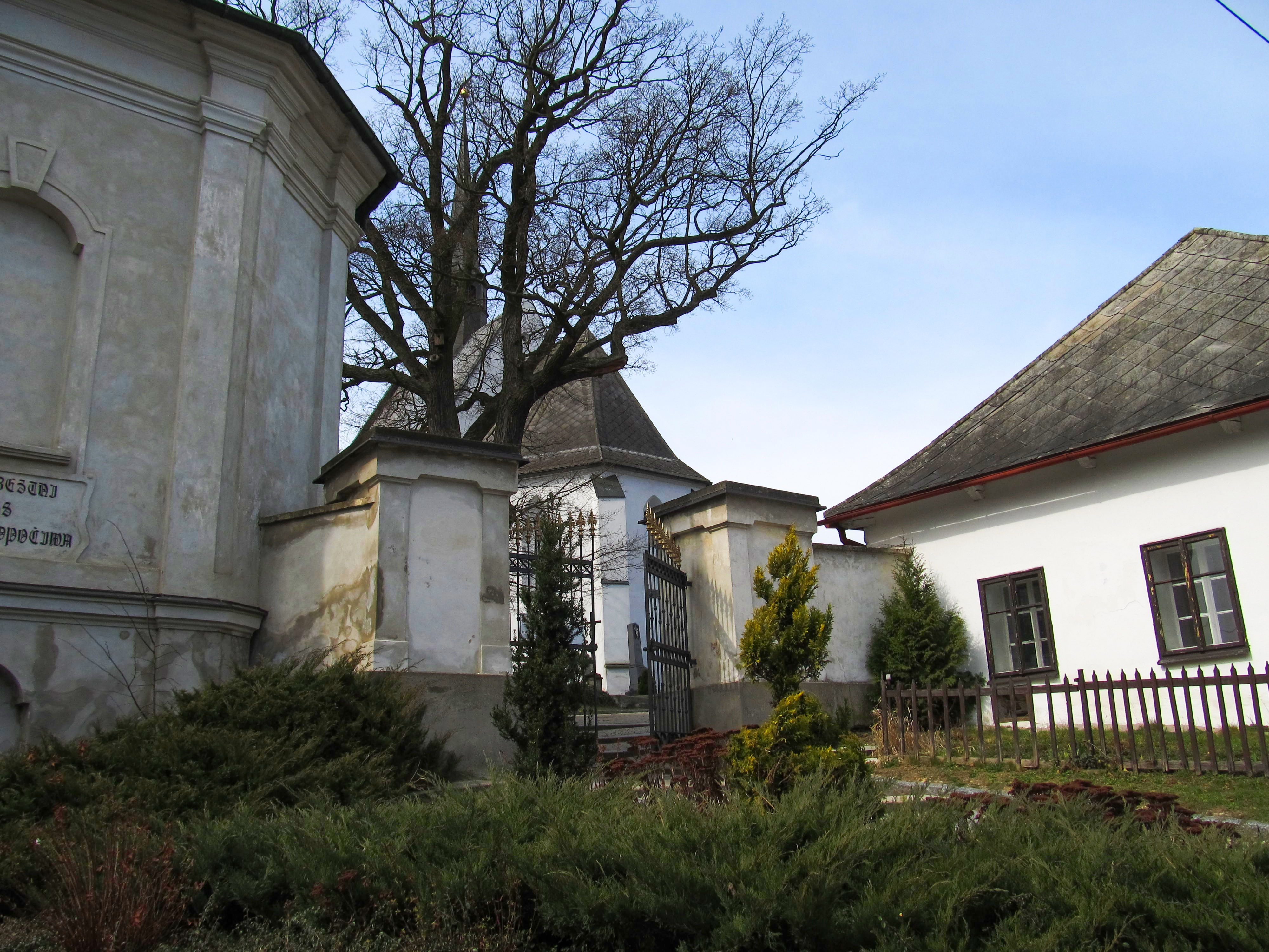 Vstup do areálu hřbitova a renesančního kostela sv. Michaela archanděla, vlevo barokní kostnice.